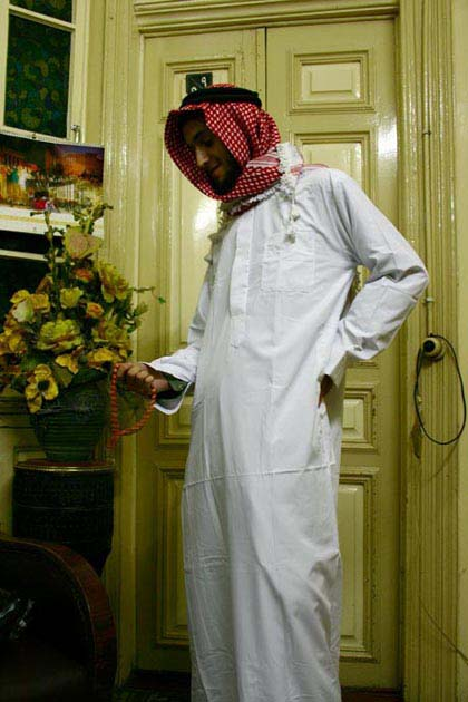 Die Galabija ist ein traditionelles ägyptisches Männergewand